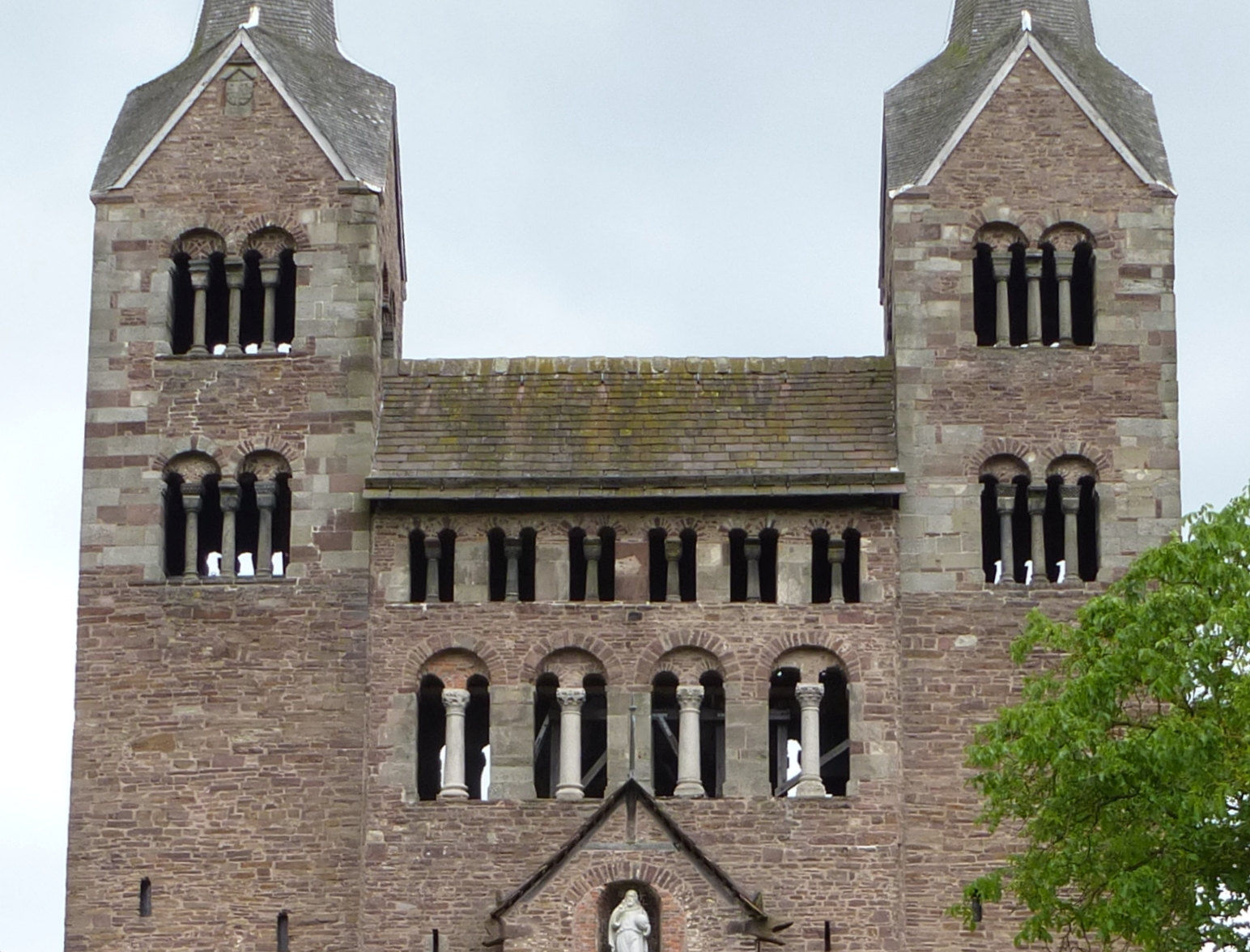 Das Westwerk der Klosterkirche Corvey 2013